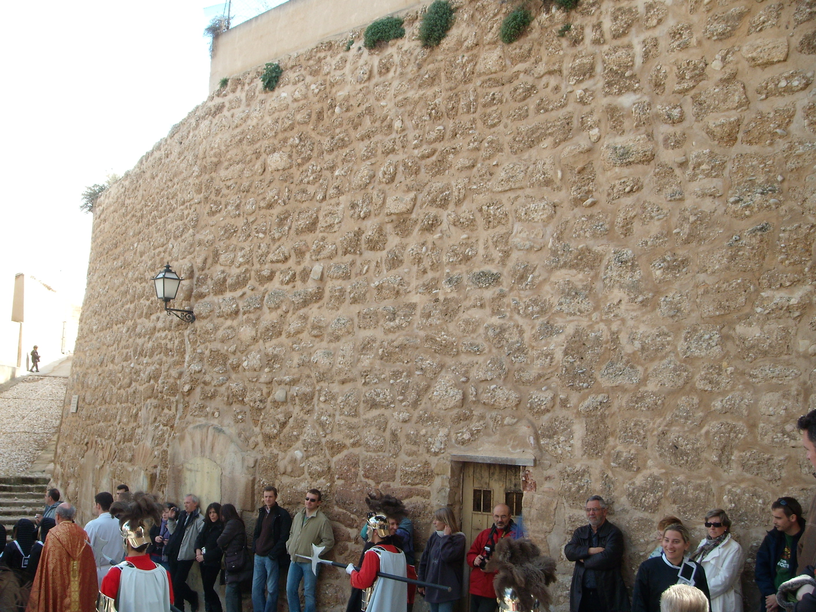 Restos del Castillo de Calanda